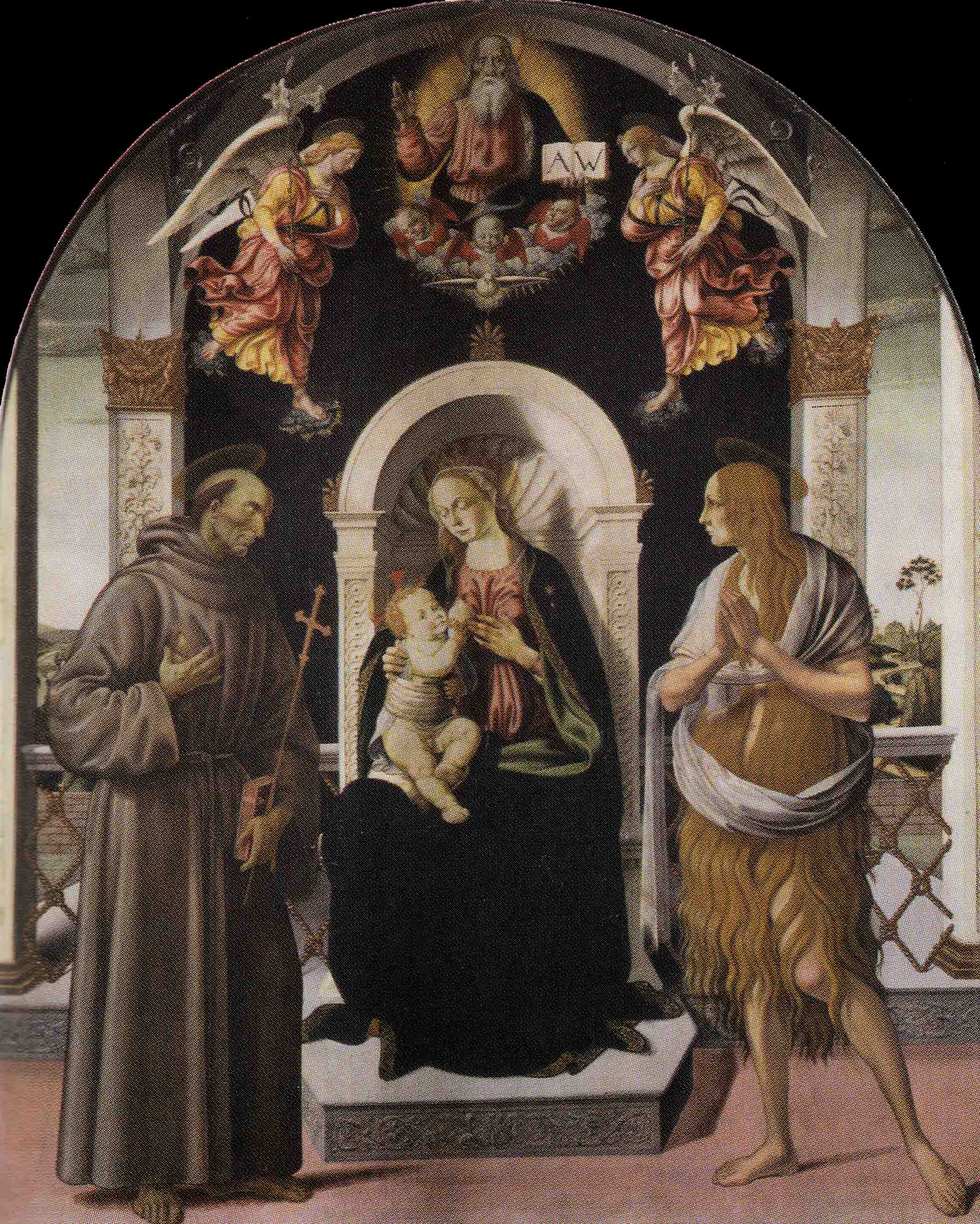 see title